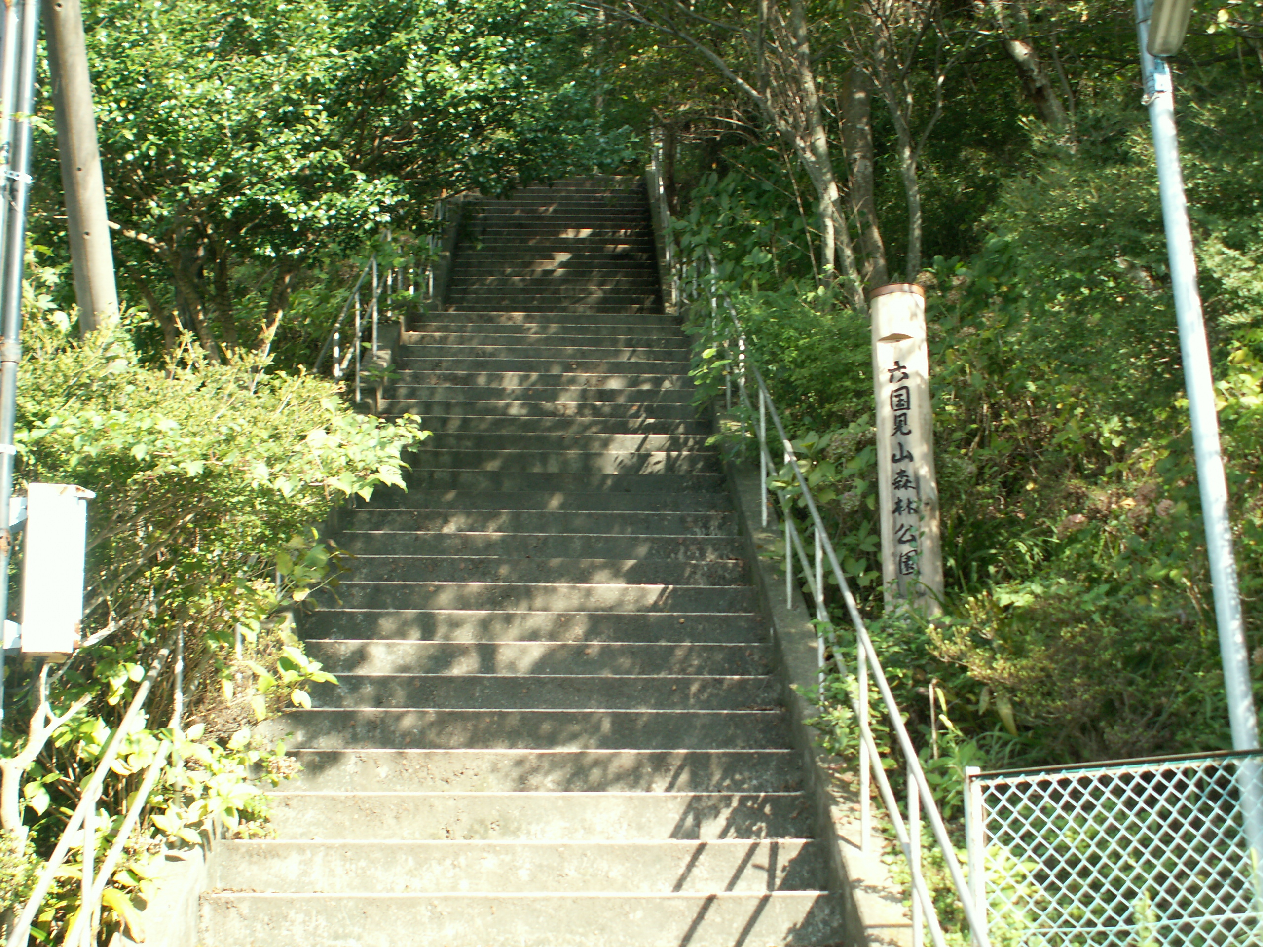 六国見山登山道